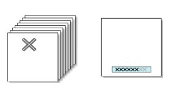 Instruktion Gedächtnis